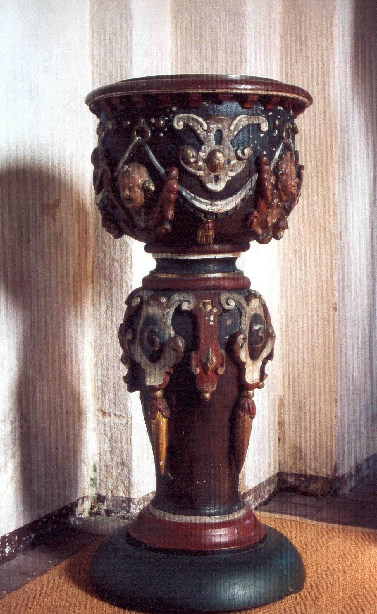 Taufstein in der St. Johannes Kirche zu Wiefelstede